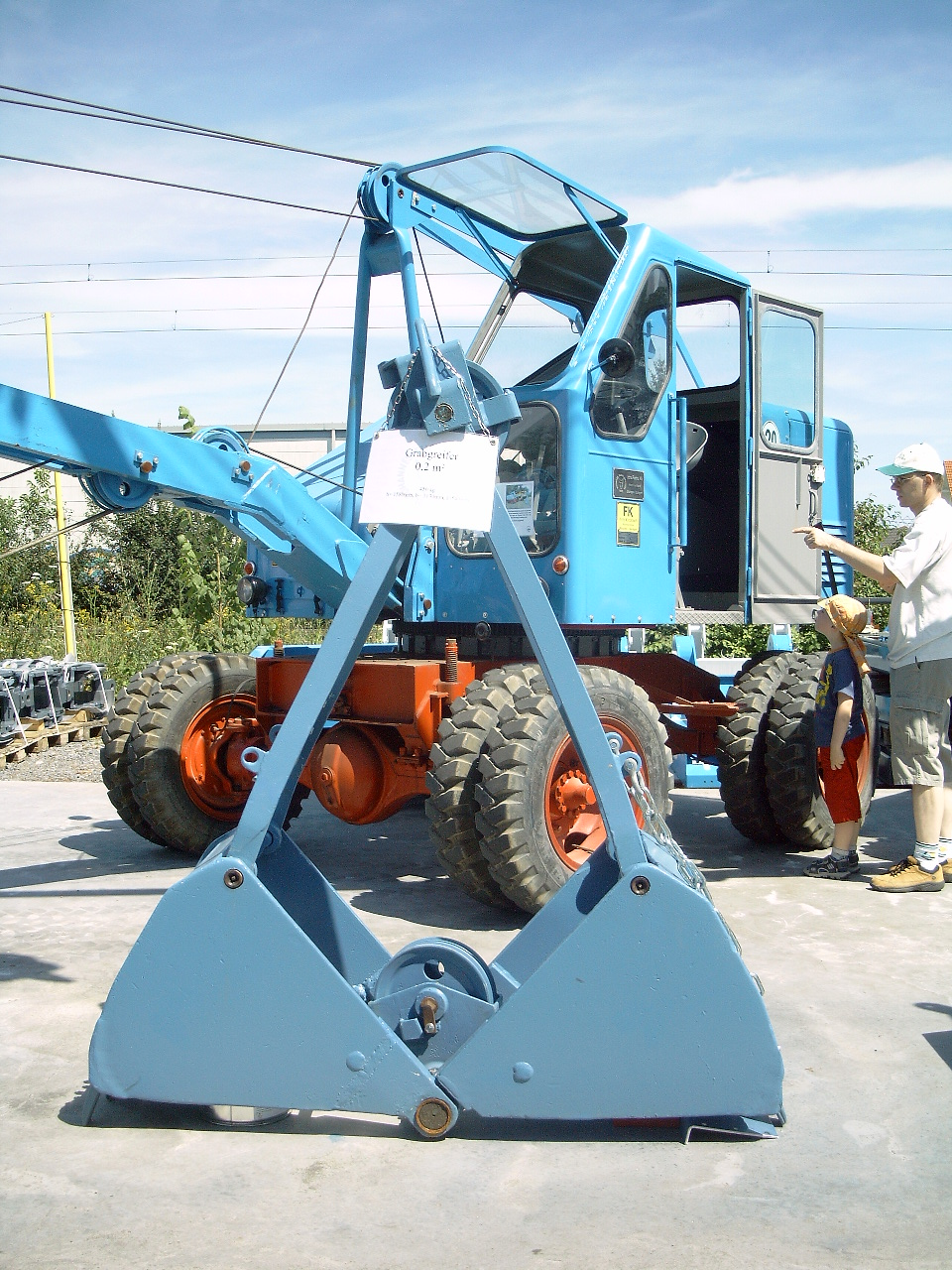 Fuchs 301 Bagger beim 50. Jubiläum des Herstellers in Bad Schönborn